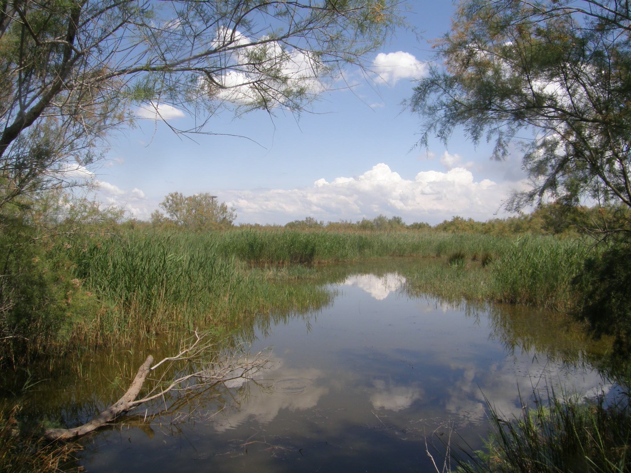 Marais de la réserve naturelle régionale du Scamandre (Gard, France)